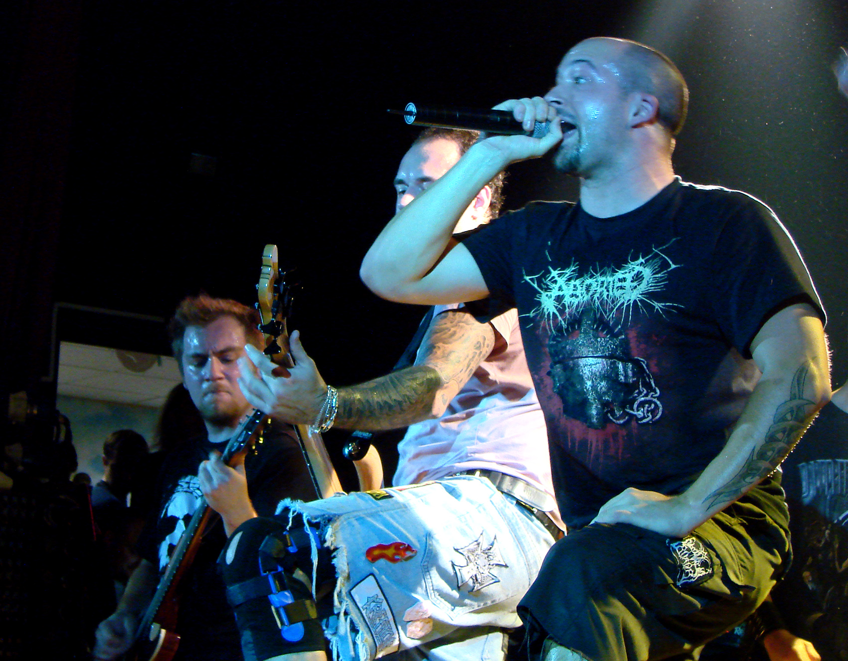 Benighted au Coolness'tival 2007, le 3/11/07 à Montdidier (60).